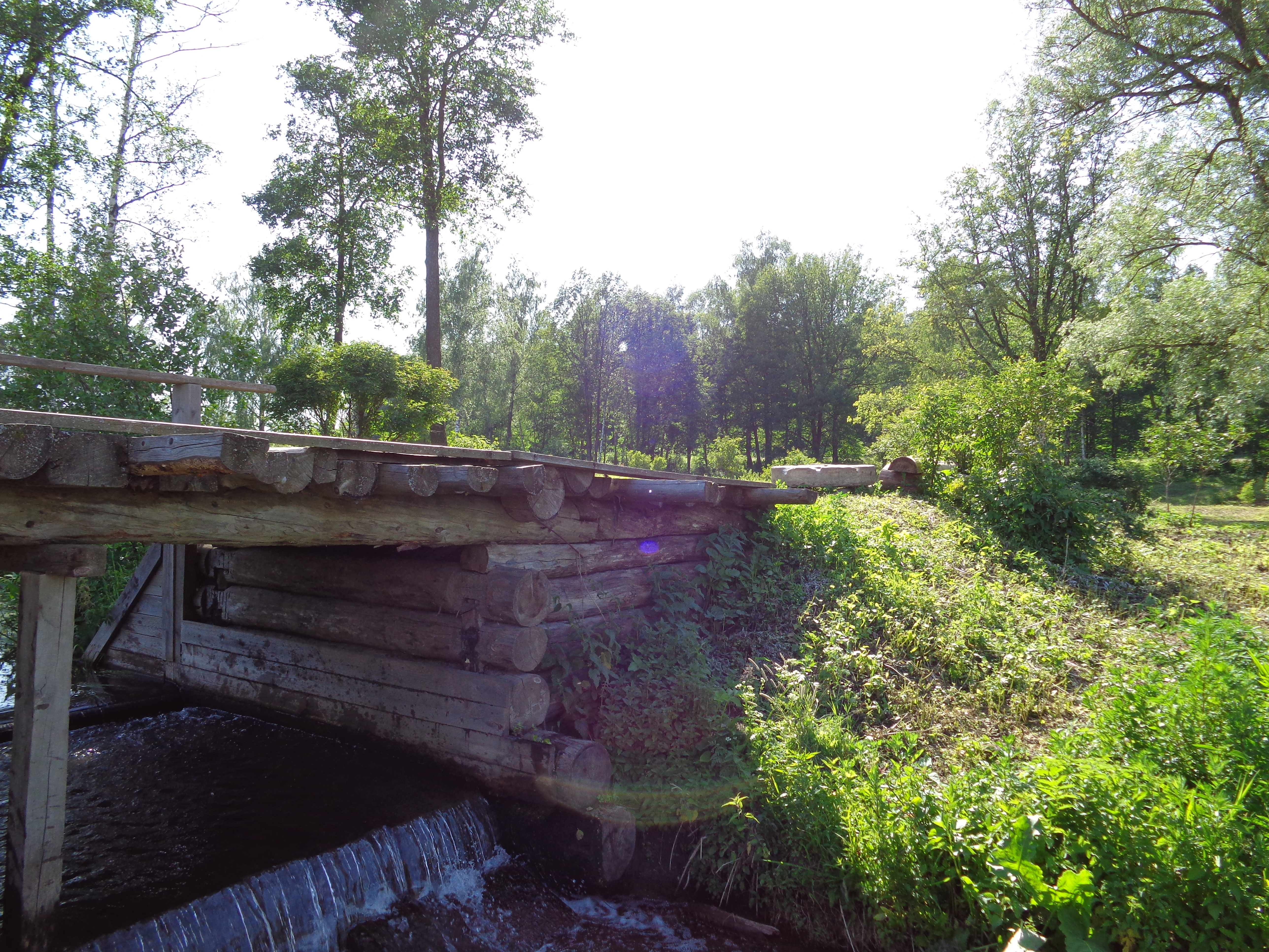 Музей-заповедник Л.Н. Толстого «Ясная поляна»: Музей-заповедник расположен в основном в пойме р. Воронки в 15 км от г, Тулы. В 3,5 км находится ж.-д. станция «Ясная Поляна» Московской ж.д. В 1 км от усадьбы проходит шоссе Москва-Симферополь, На севере, северо-востоке и северо-западе ООПТ граничит с Тульскими засеками (земли Гослесфонда), на юге и юго-востоке — с сельхозугодьями, на востоке — с территорией Яснополянской больницы,д. Ясная Поляна,Щёкинский район, Тульская область This image is related to the protected area of Russia number 7100085